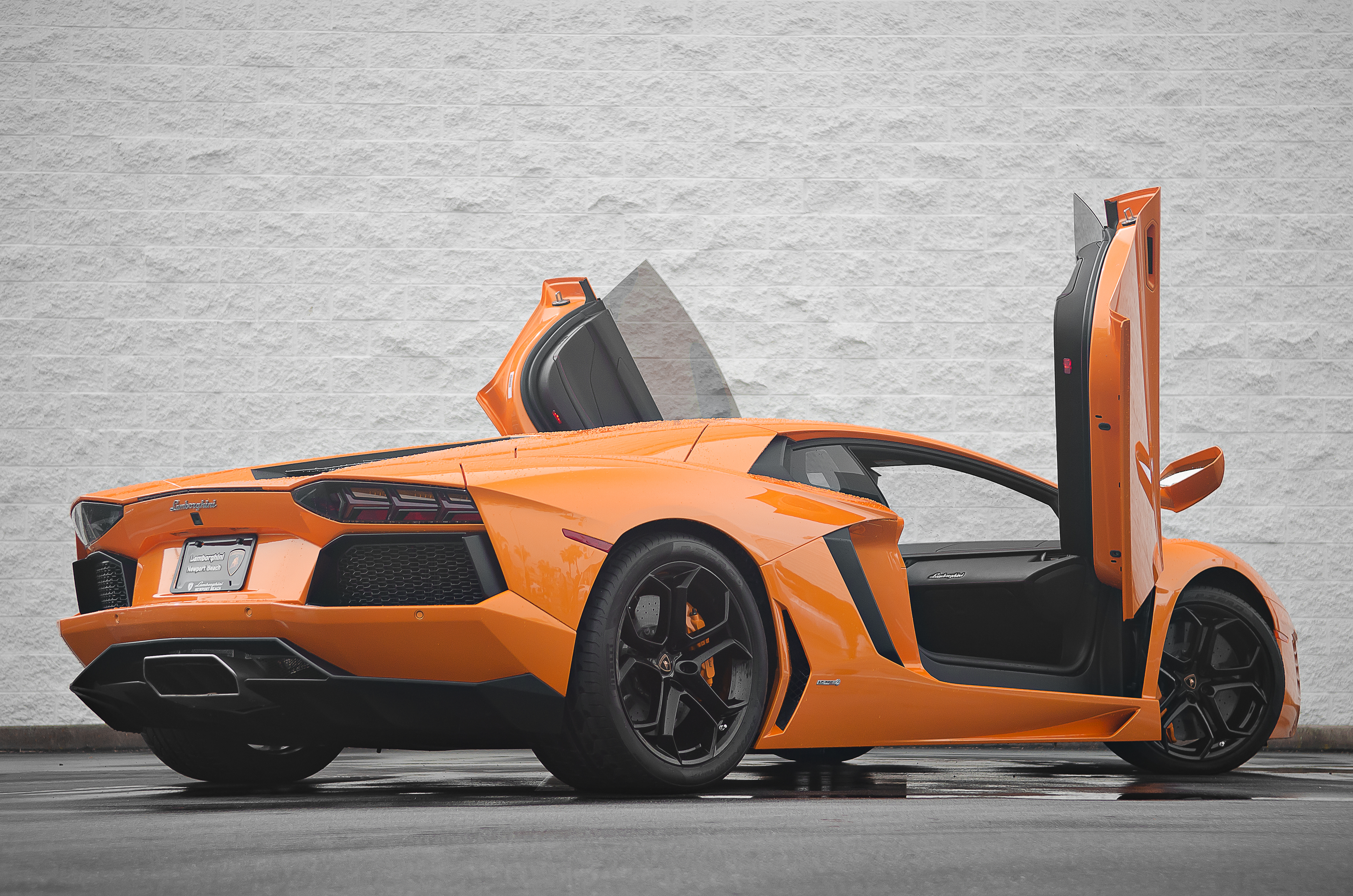 Orange Lamborghini Aventador LP700 Doors Up.